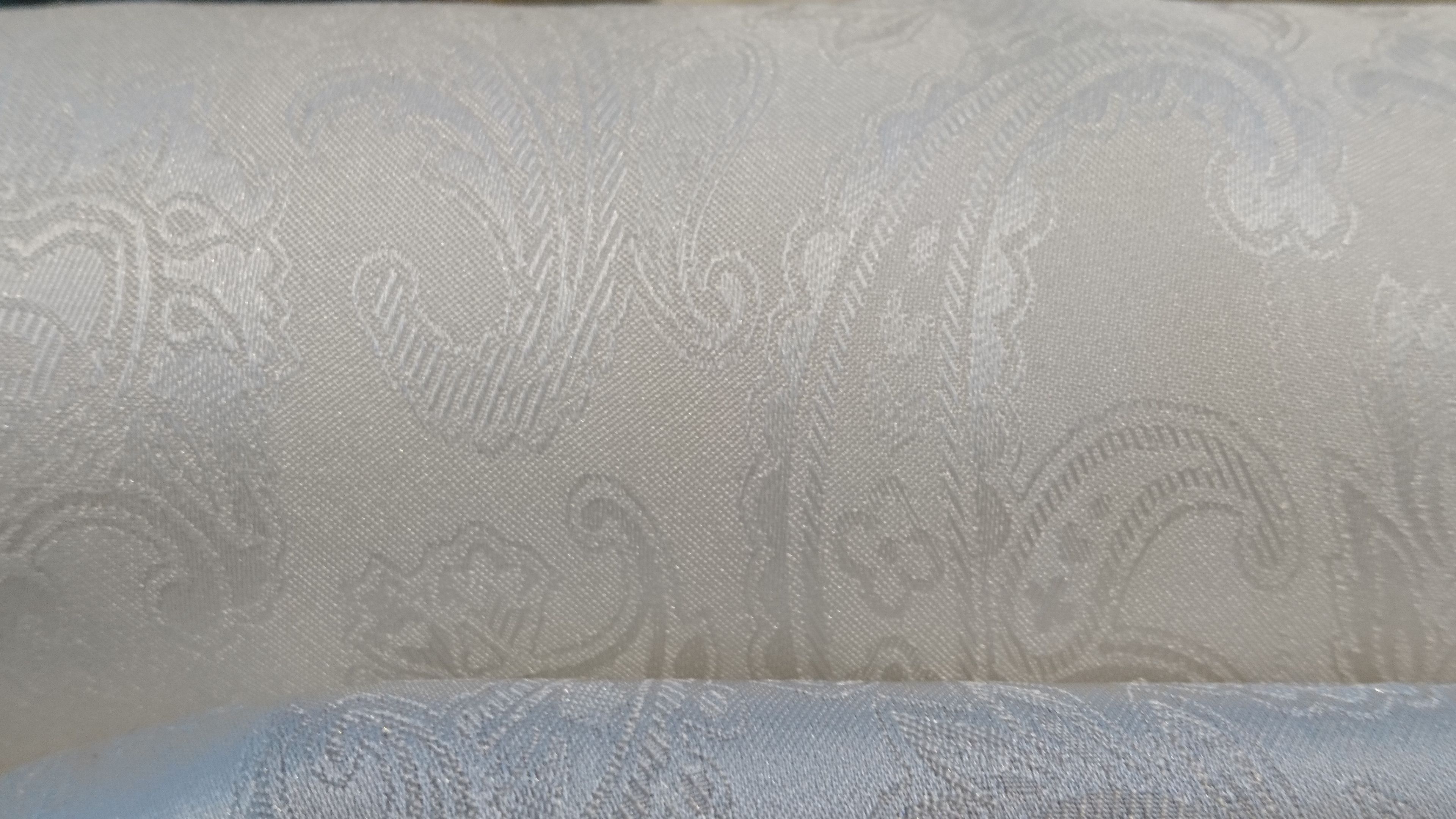 丹後ちりめんのシャガート織り。